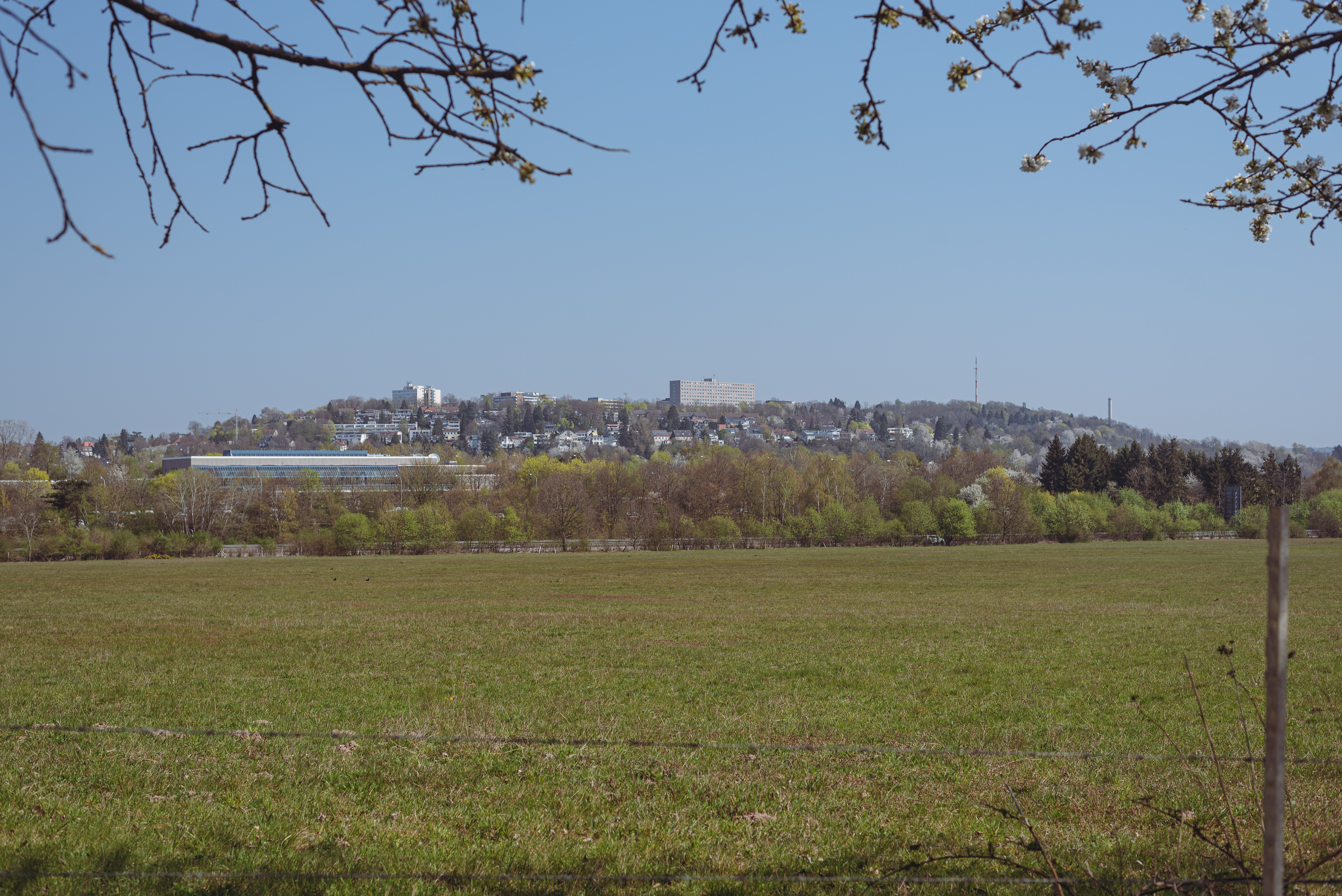 Blick aus dem Almet auf den Winterberg mit dem Klinikum Saarbrücken. Rechts davon ist auch der Sender Saarbrücken-Winterberg zu sehen.